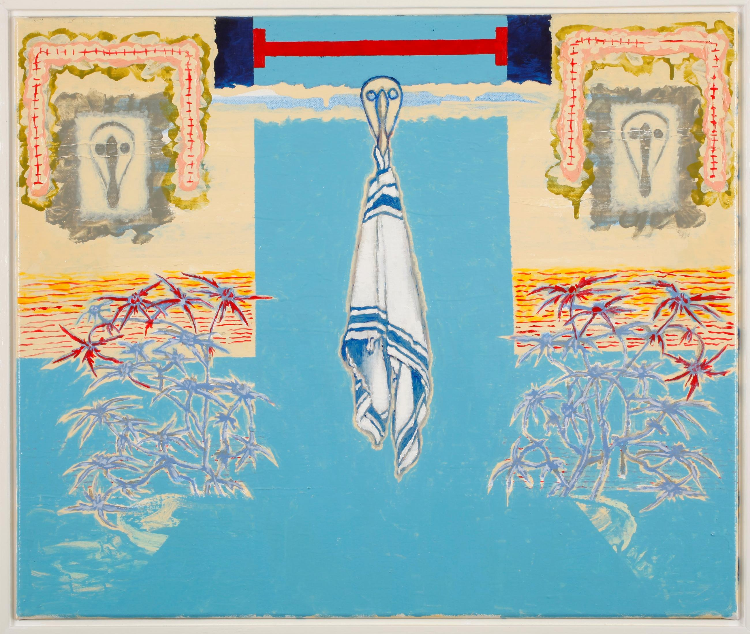 מגבת מטבח על גשר צר, 2008, שמן על בד, 50/60 ס"מ